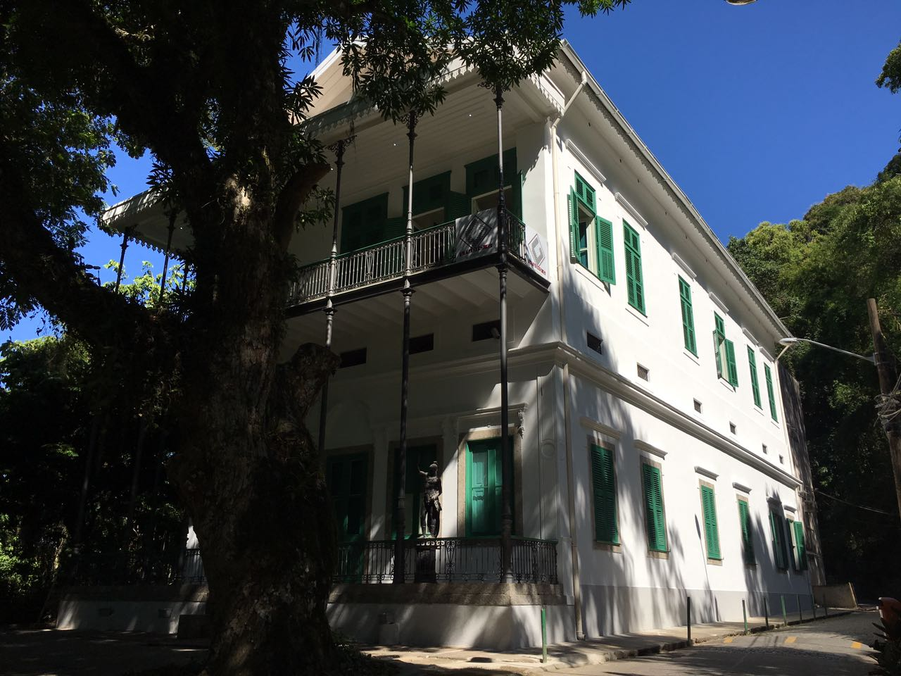 Solar de Santa Marinha. Prédio principal do conjunto arquitetônico do Museu Histórico da Cidade do Rio de Janeiro